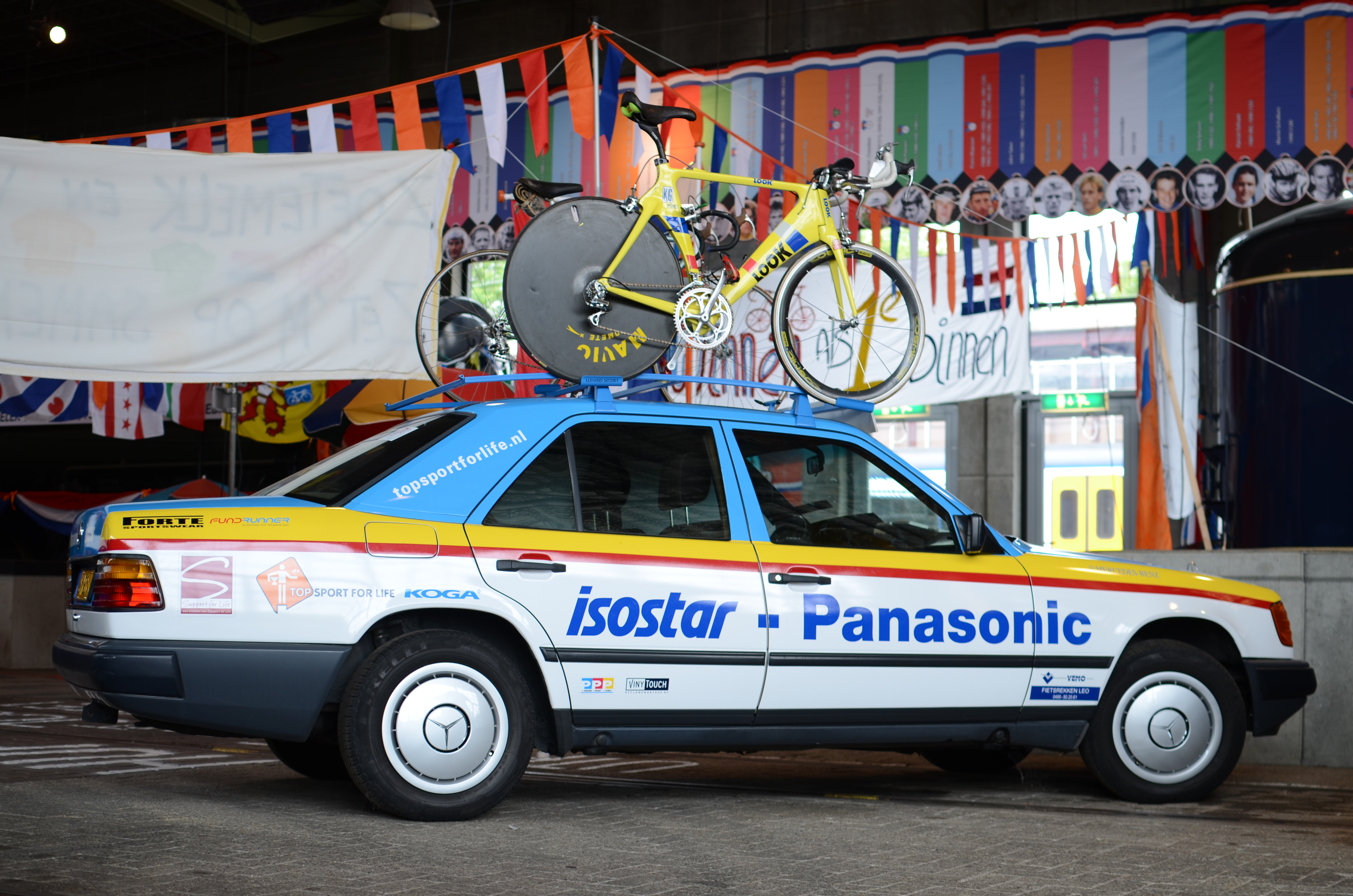 Een auto van de Panasonic Isostar-wielerploeg in de Tour de France.